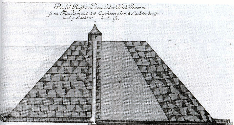 Historische Querschnittzeichnung des Oderteichdammes: Links und rechts das Zyklopenmauerwerk aus großen Granitsteinen. Mittig die Dichtung aus festgestampften Granitgrus. Des Weiteren erkennt man links der Dichtung den Striegelschacht; die Grundablassleitungen sind ganz unten angedeutet. Die tatsächliche Ausführung weicht aber geringfügig von dieser Zeichnung ab.